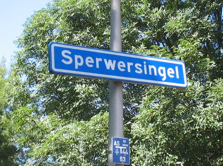 Bord Sperwersingel in de Vogelbuurt